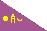 Summary Drapeau de la principauté d'Udaipur Source Shiva-Nataraja Statut Gérald Anfossi Catégorie:Drapeau de principauté des Indes